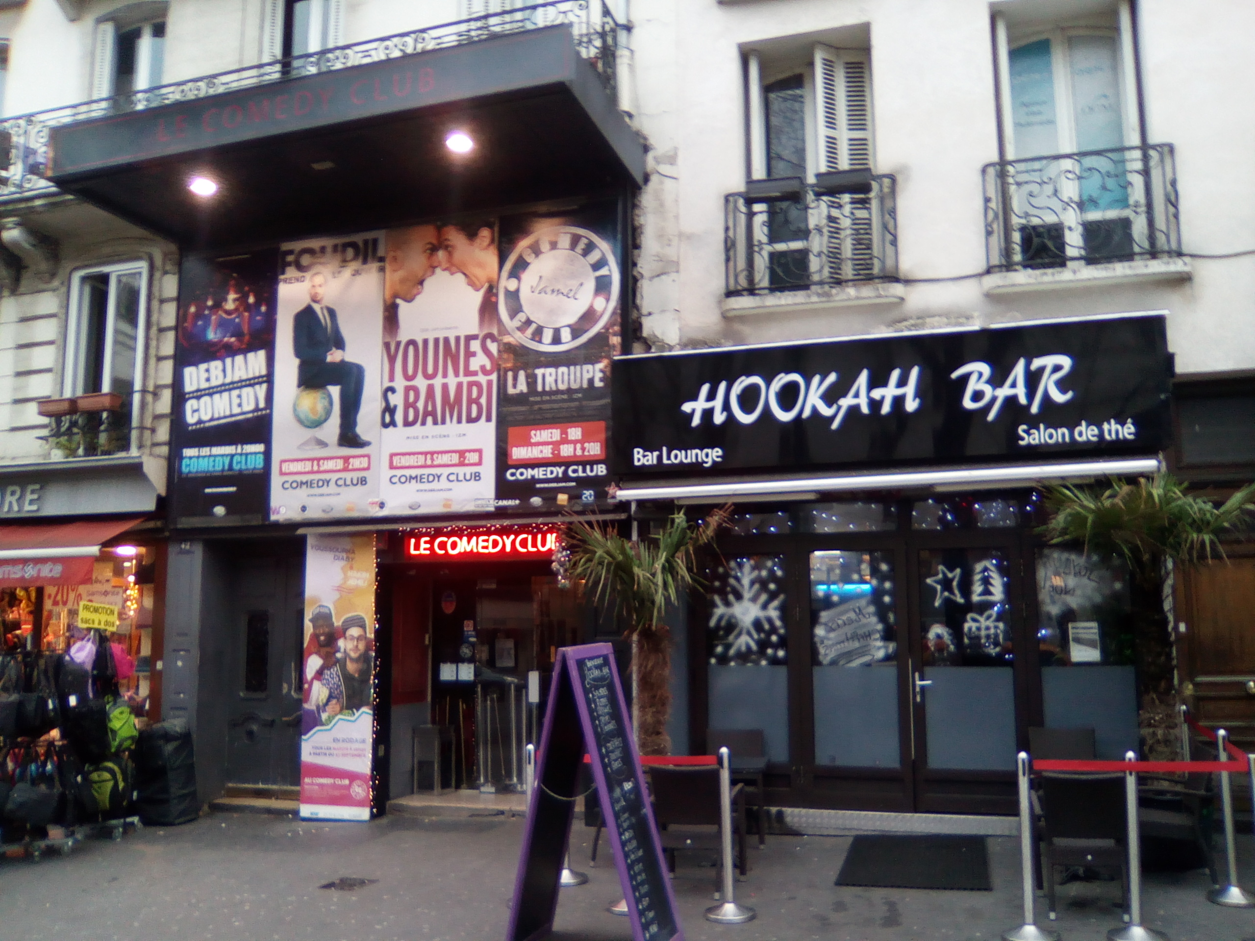 Le Comedy Club fondé par Jamel Debbouze, boulevard de Bonne-nouvelle à Paris.